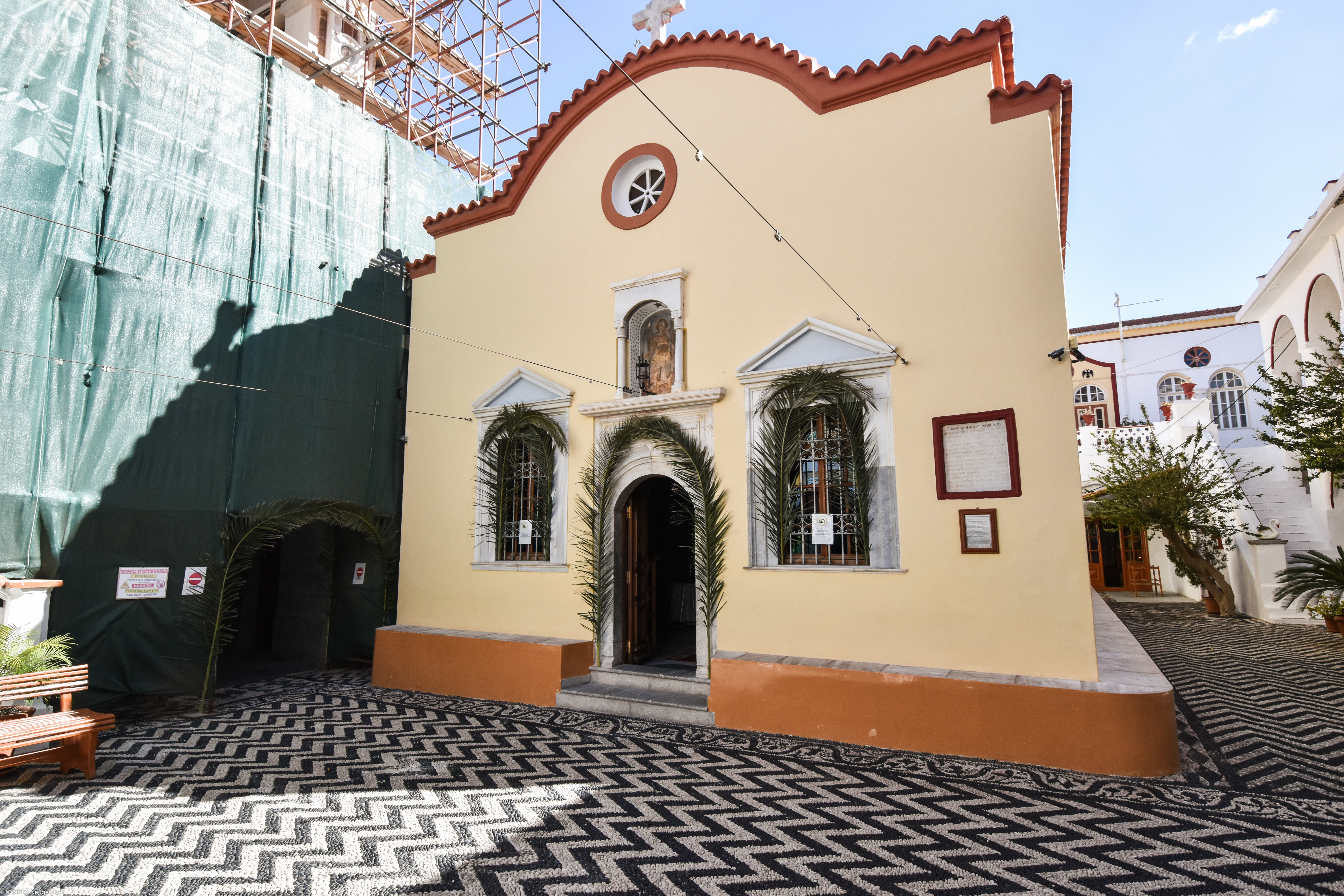 Das Katholikon im Zentrum des Klosters Panormitis auf der Insel Symi